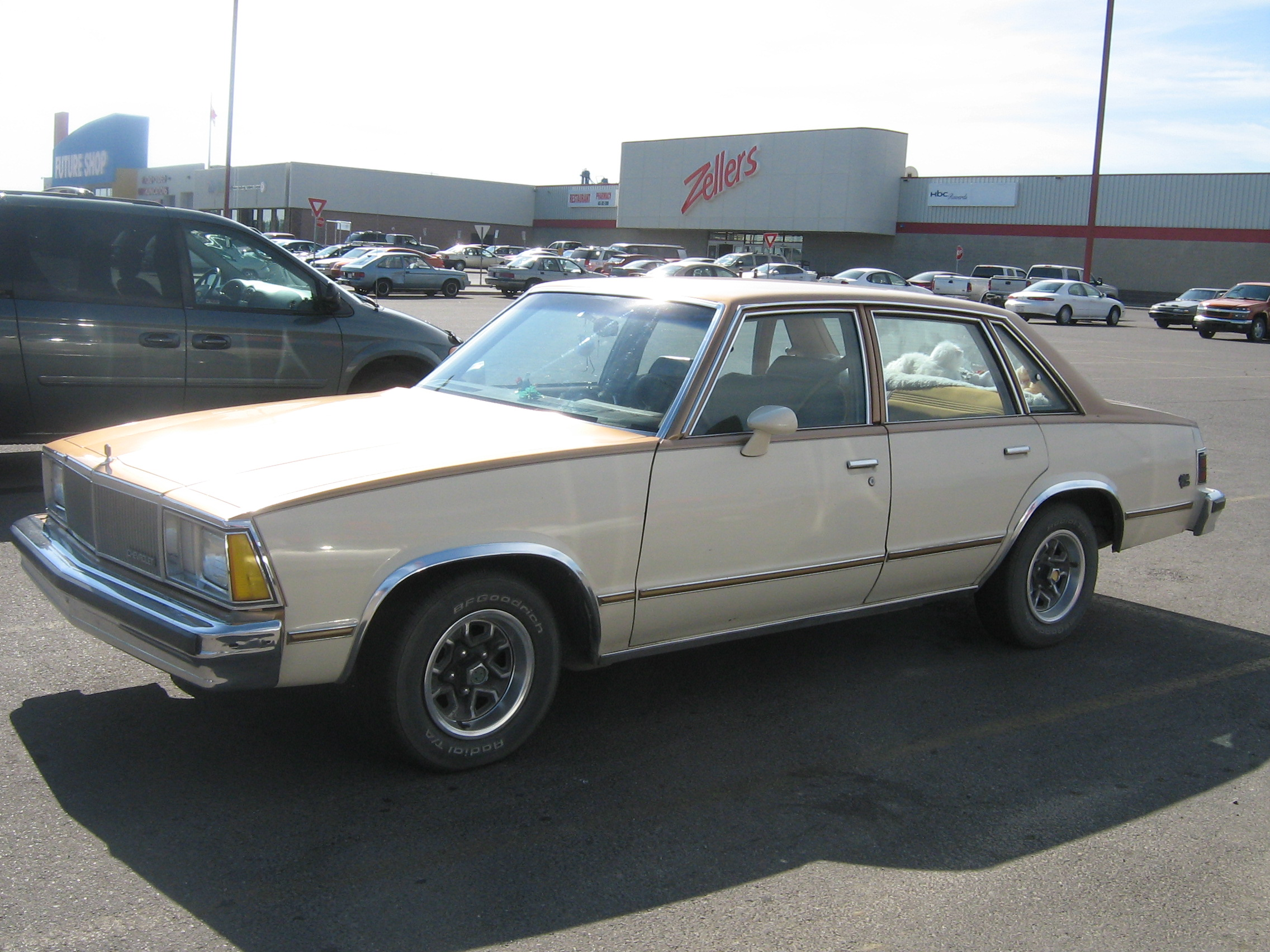 1980 Chevrolet Malibu Classic